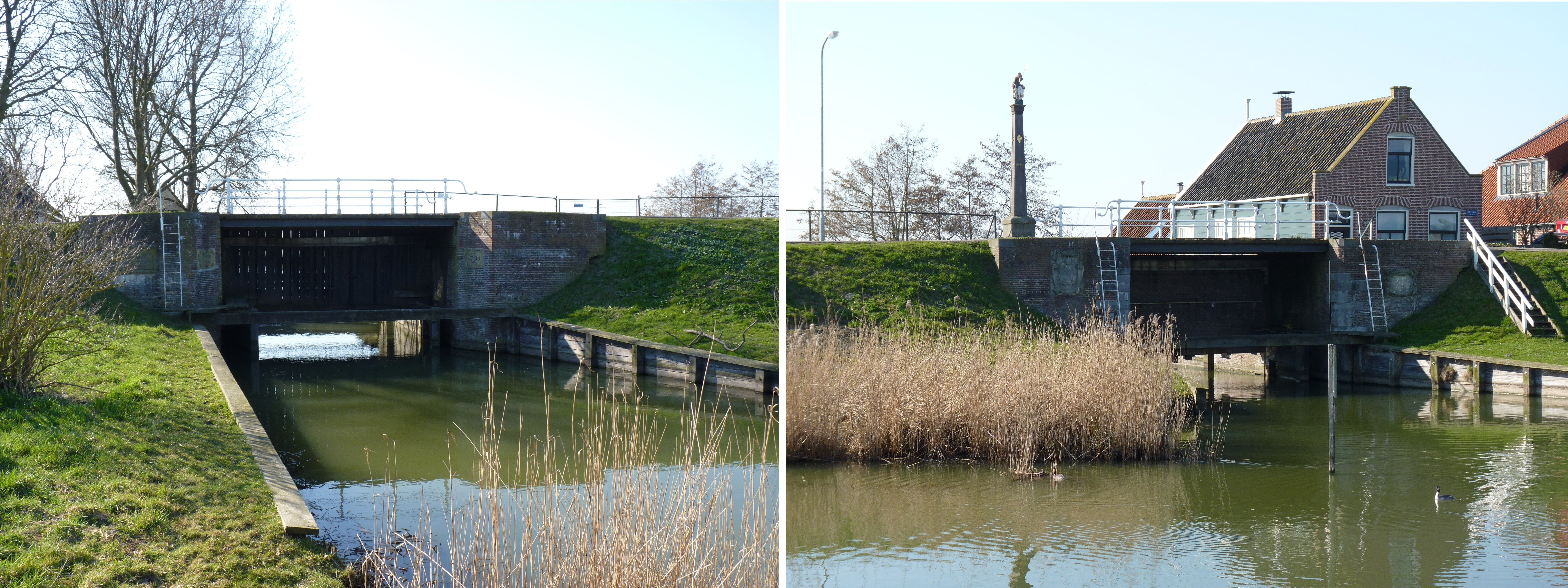 Schardam Zuider en Noordersluis